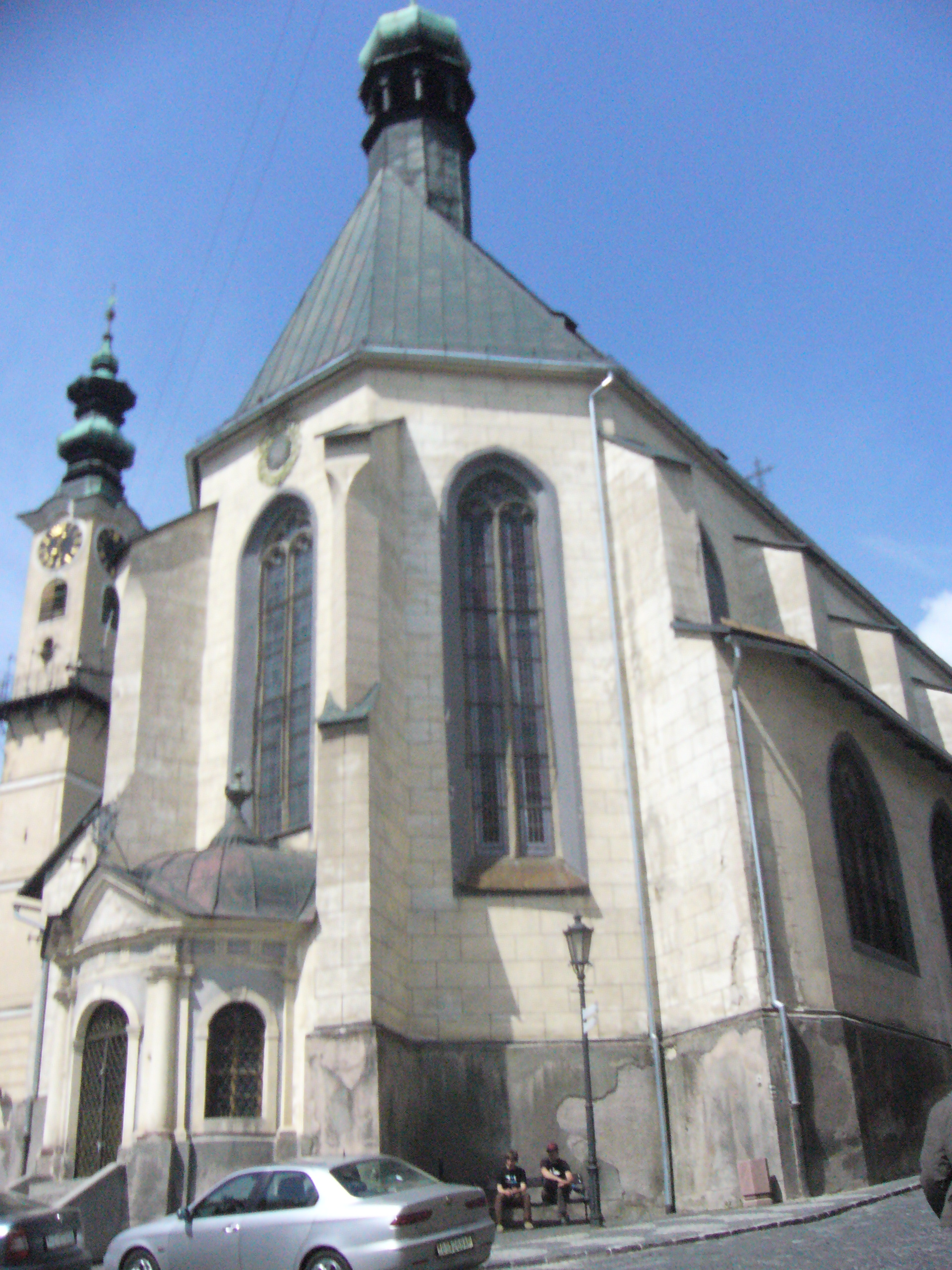 Kostol sv. Kataríny - pohľad z ulice A. Kmeťa This medium shows the protected monument with the number 602-2485/0 in the Slovak Republic.